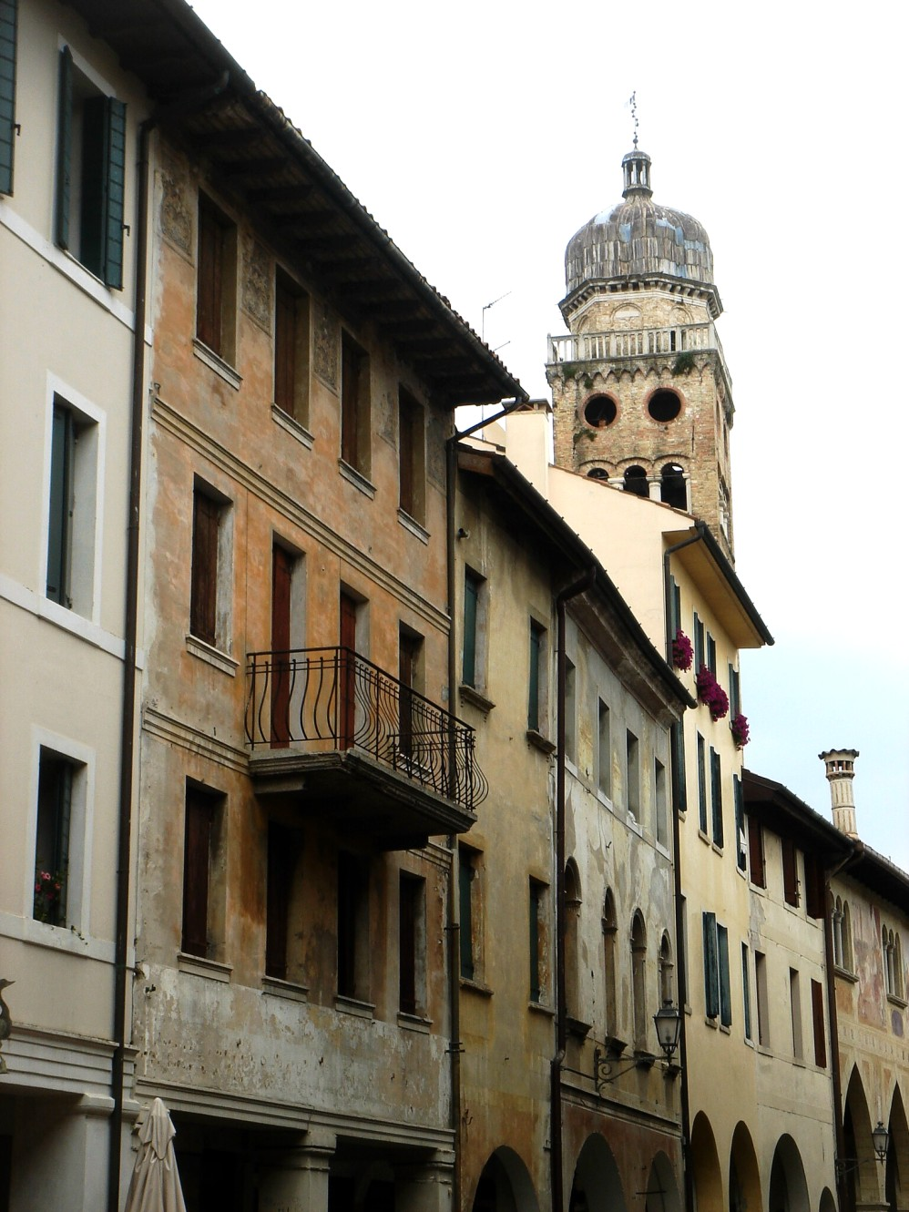 Conegliano (Treviso): scorcio della Contrada Granda da Porta Dante, con il campanile del Duomo dell'Annunziata.